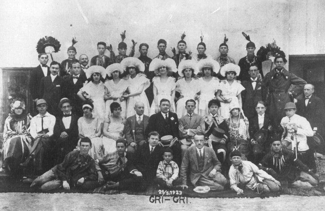 Towarzystwo Muzyczno-Dramatyczne „Gamba” (1923-05-21). Na zdjęciu Marian Kawski, Stanisław Budweil